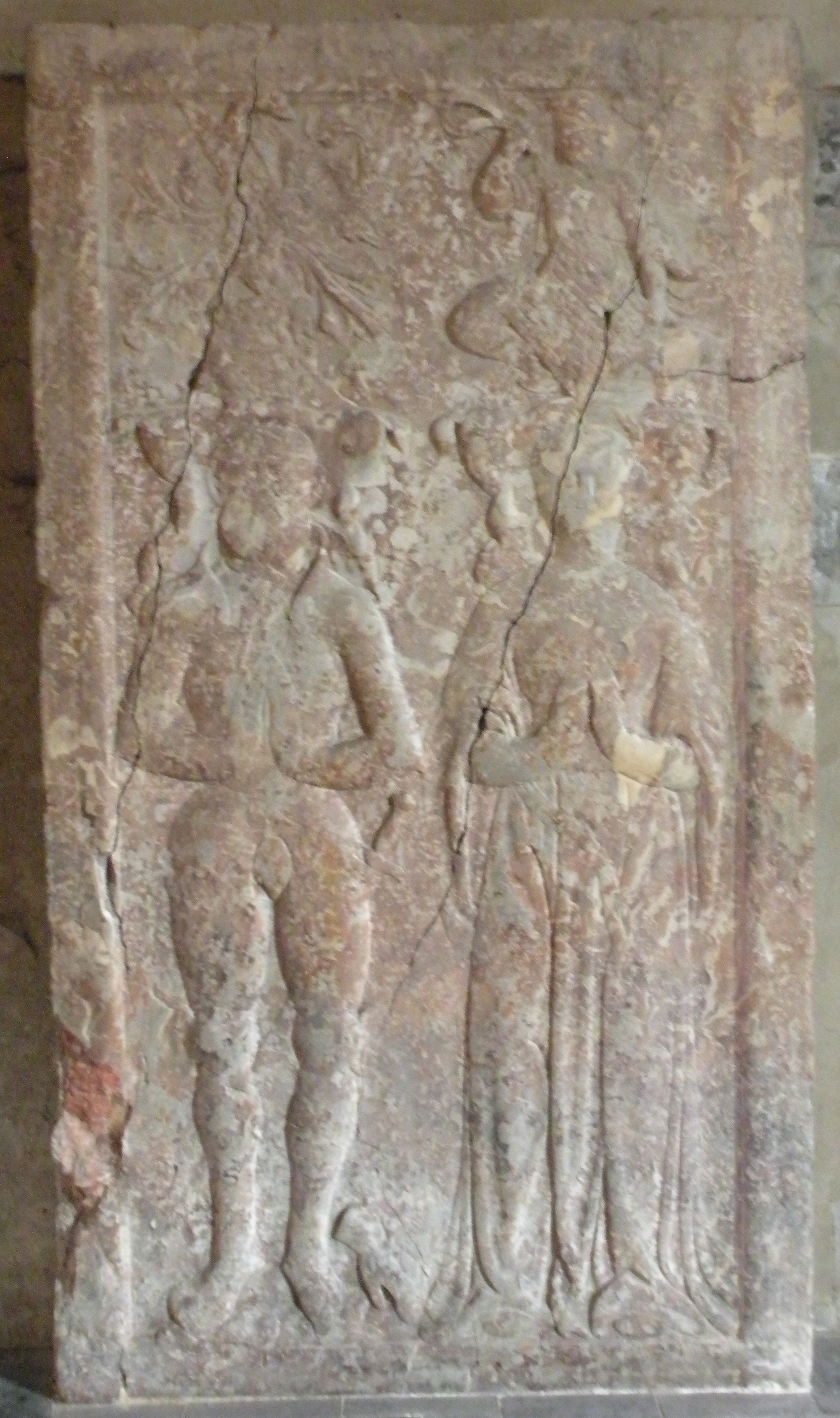 Pierre tombale d'Adrien de Blois dans la collégiale Saint-Nicolas d'Avesnes-sur-Helpe.